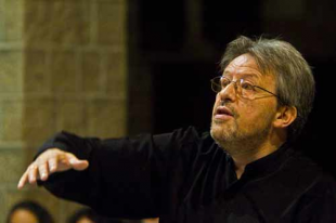 Ramiro Soriano dirigiendo